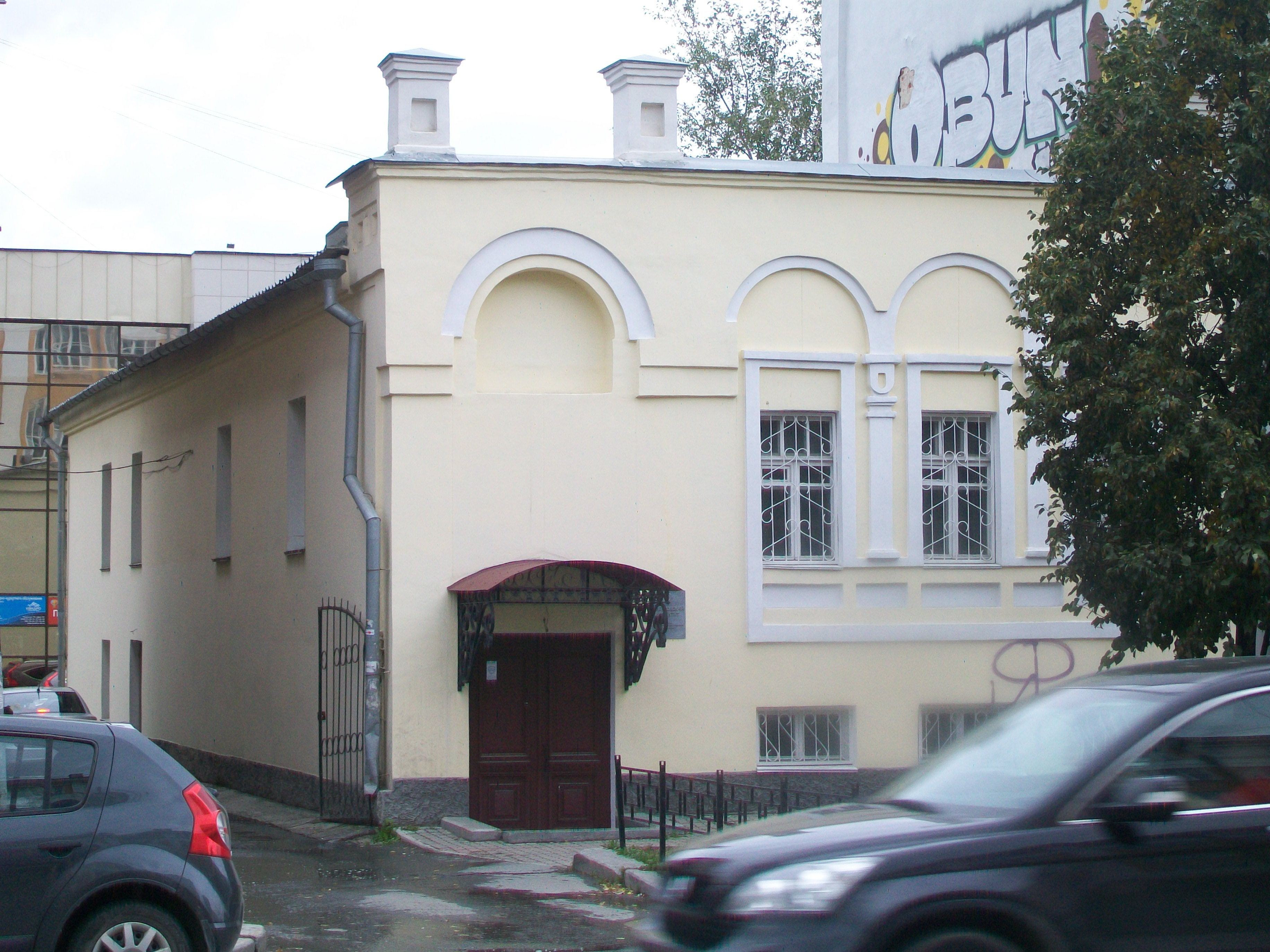 Здание Демидовского института в Екатеринбурге